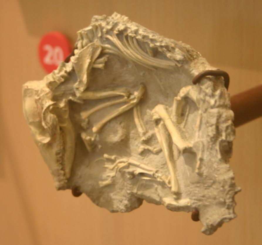 Leptictis cf. acutidens fossil